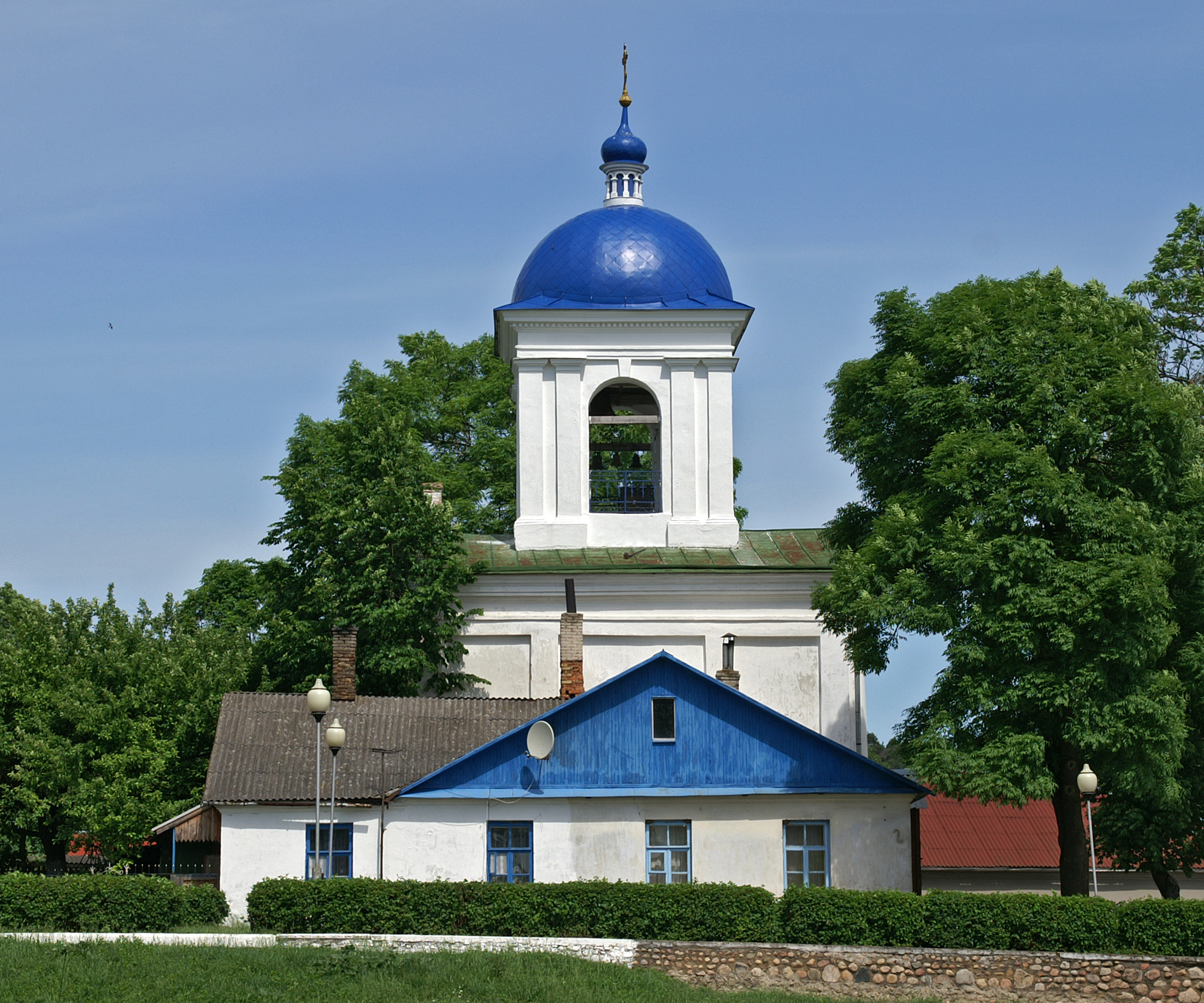 Беларуская (тарашкевіца): Ансамбаль Сьвята-Усьпенскага манастыра:Усьпенскі сабордэкаратыўнае аздабленьне:росьпіс у консе «Спас Пантакратар», арнамэнтальны дэкор на скляпеньнях паўднёвай сакрысьціі і ўсіх нэфаў, іканастас, бакавыя алтарыБогаяўленская царкваКрыжаўзьвіжанская царквазваніцабудынак сэмінарыіжылы корпусгаспадарчыя пабудовы. в. Жыровічы This is a photo of Belarusian heritage monument. Reference number: 411Г000537 ( WLM)